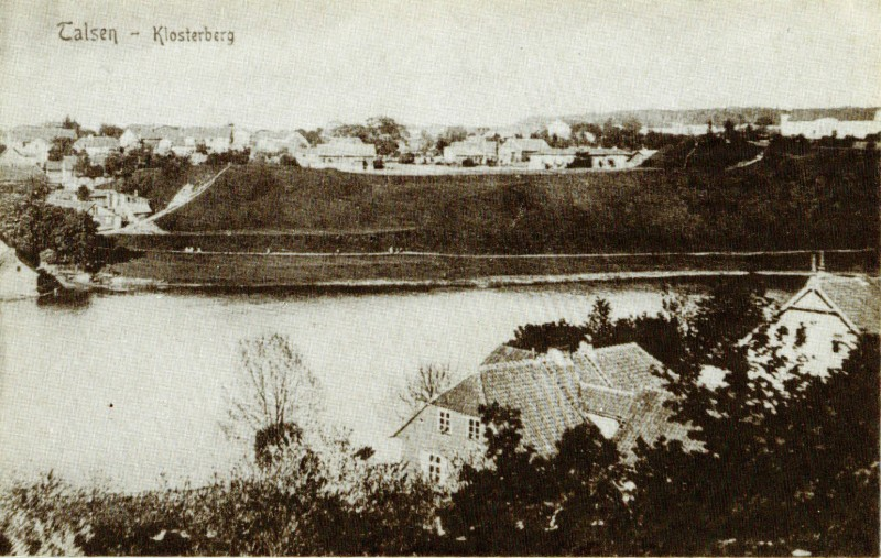 Vaade Talsi linnamäele